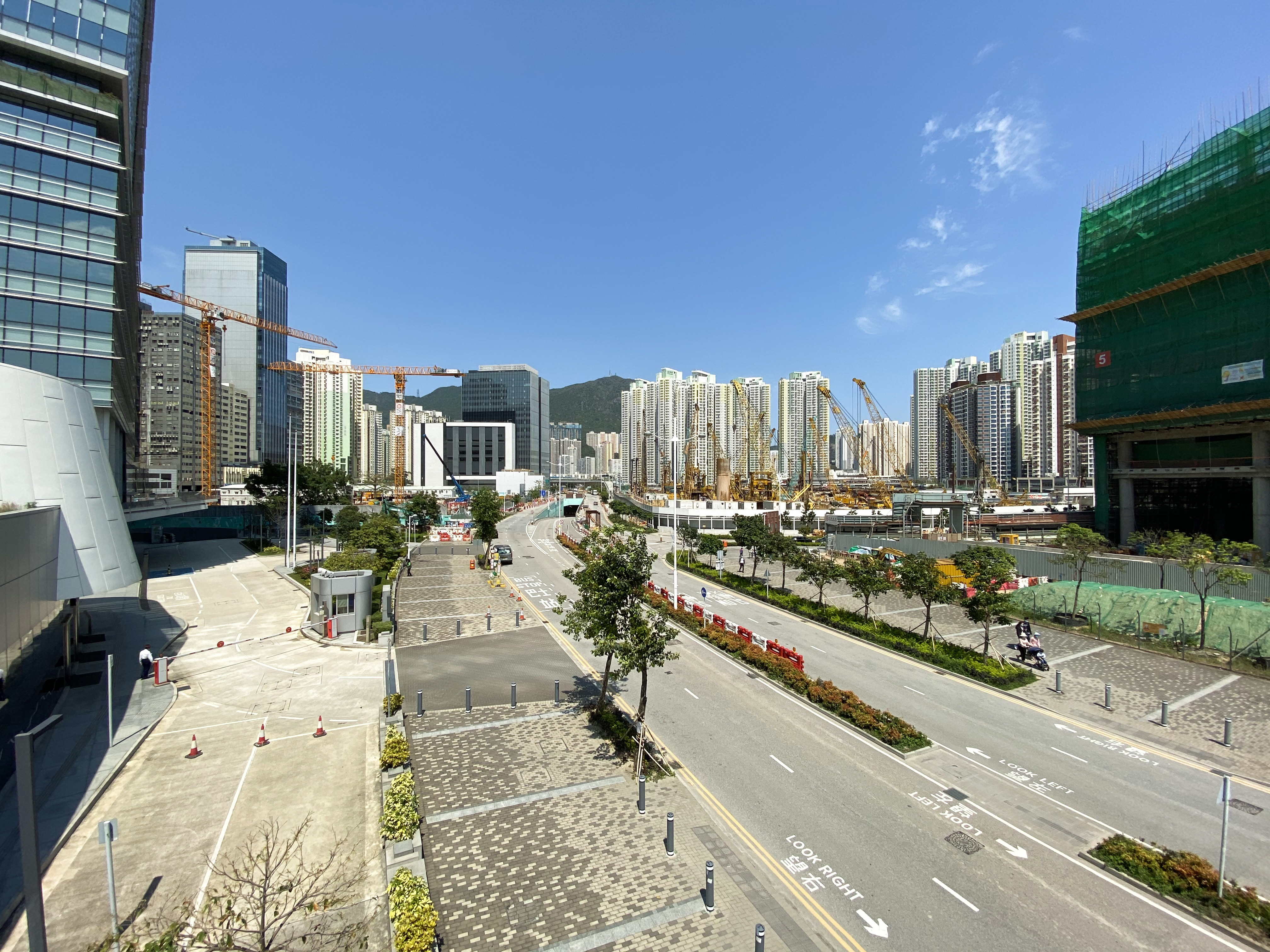 Corncorde Road